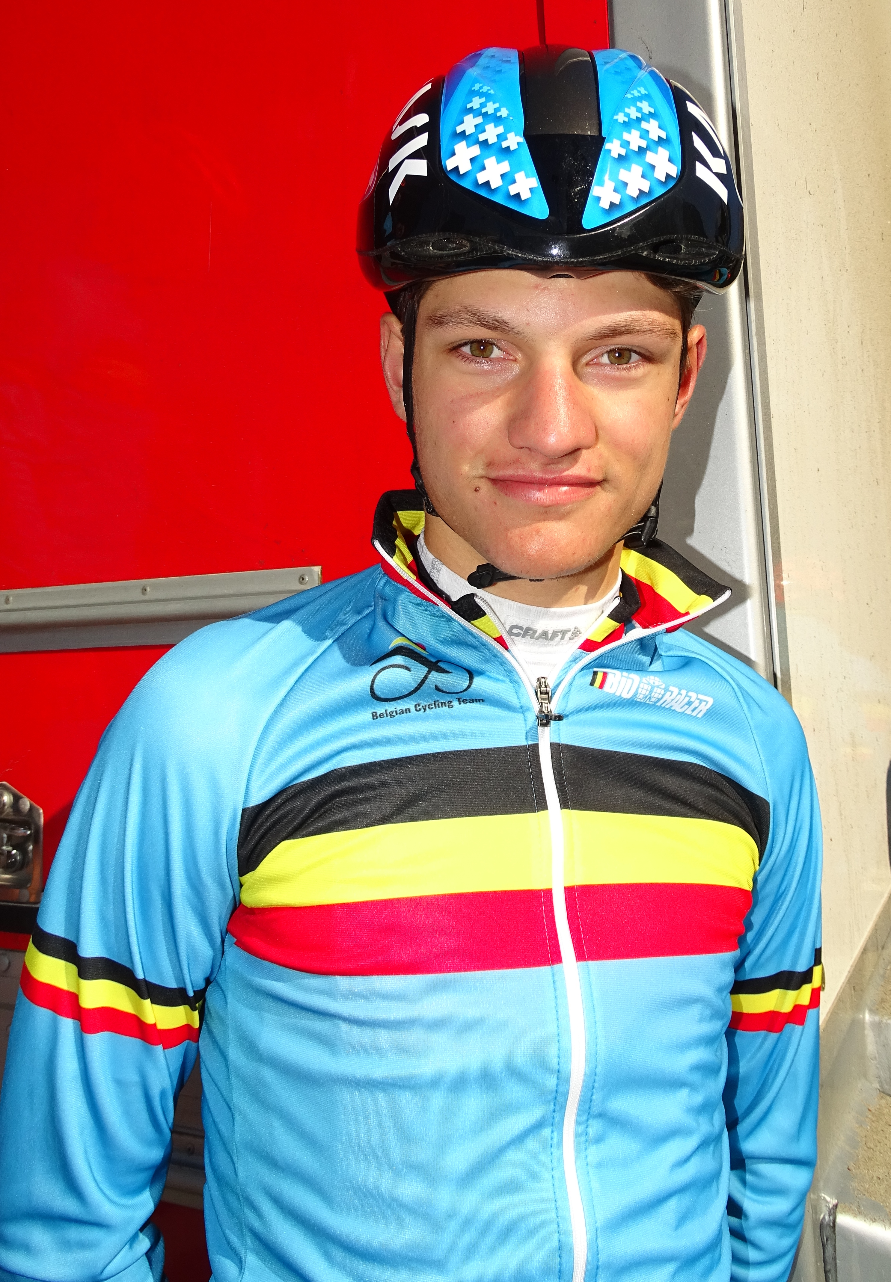 Reportage réalisé le dimanche 10 avril à l'occasion du départ du Paris-Roubaix juniors 2016 à Saint-Amand-les-Eaux, France.